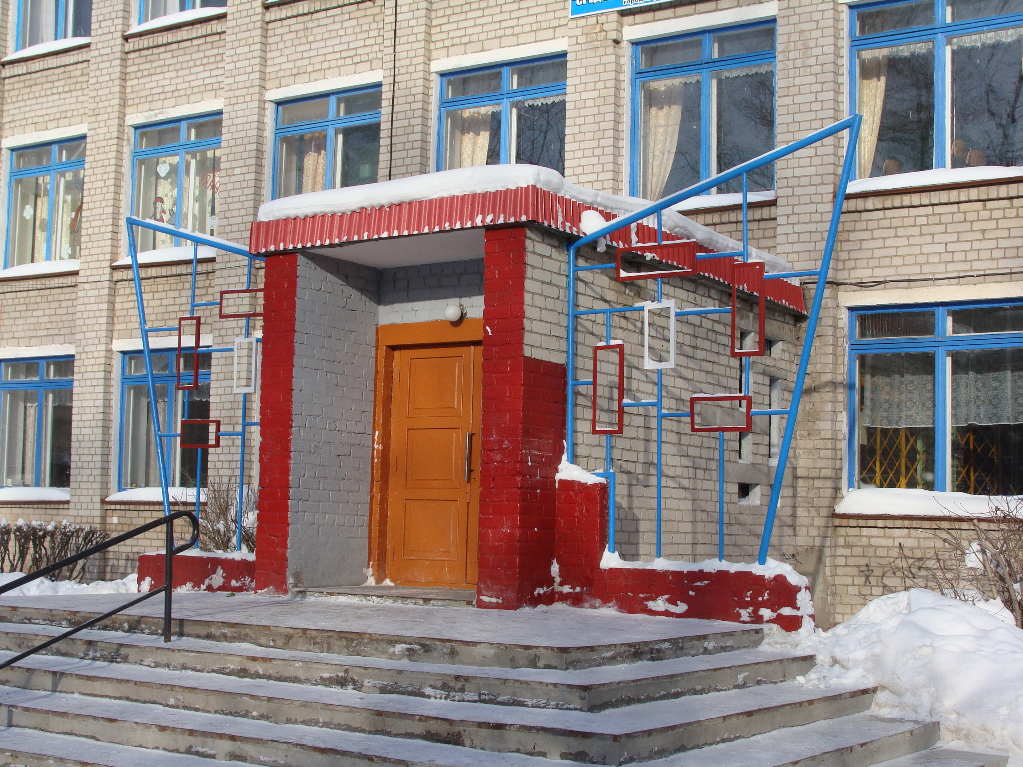 Тамбур на крыльце школы